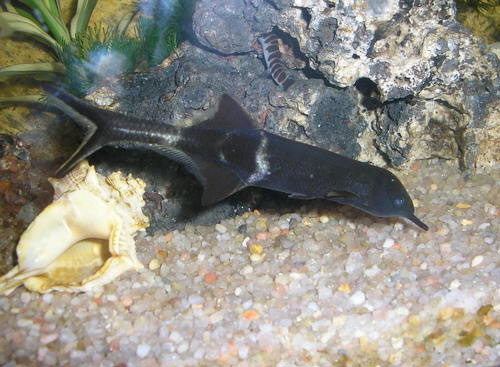 pez elefante